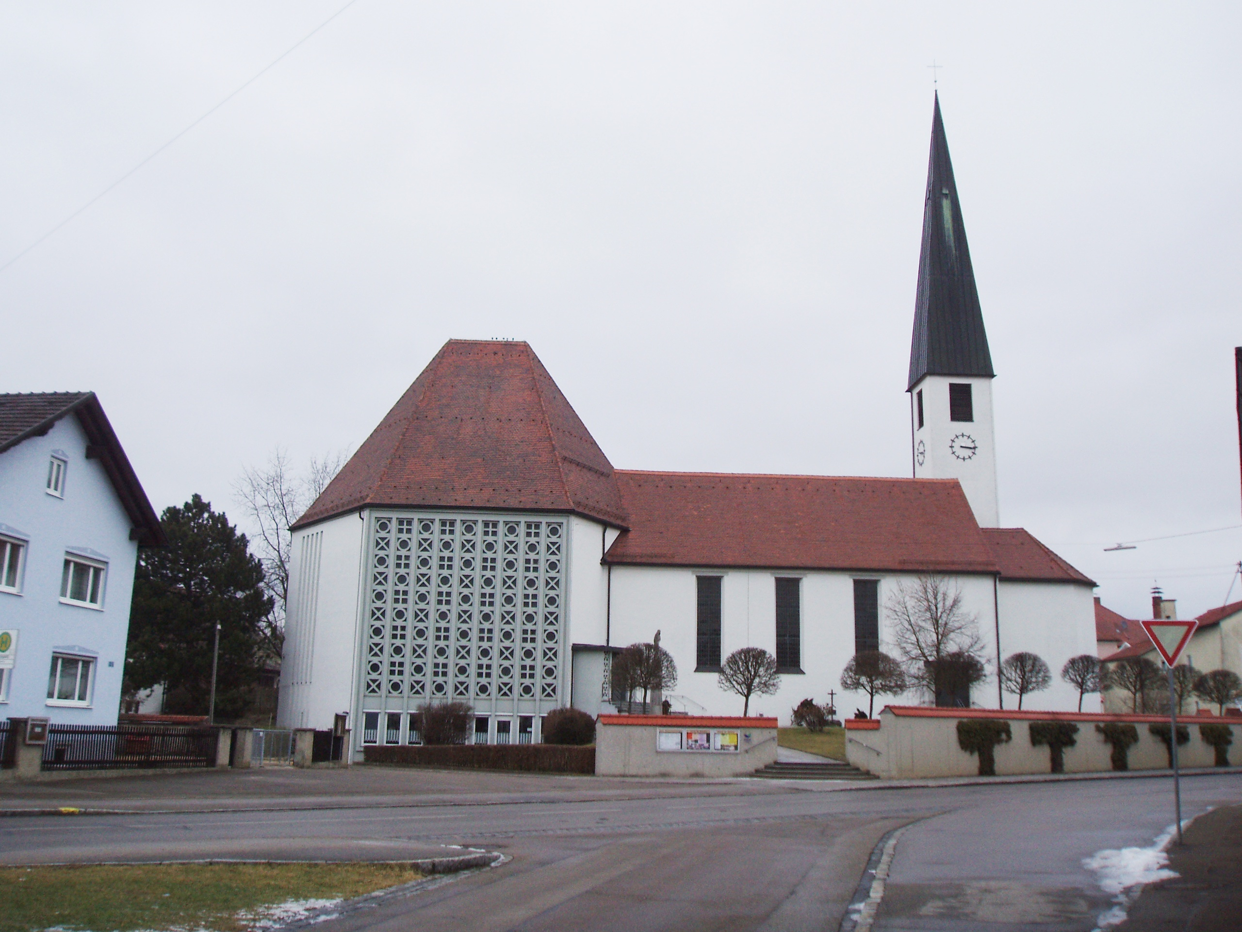 Eitensheim im Landkreis Eichstätt, Pfarrkirche St. Andreas